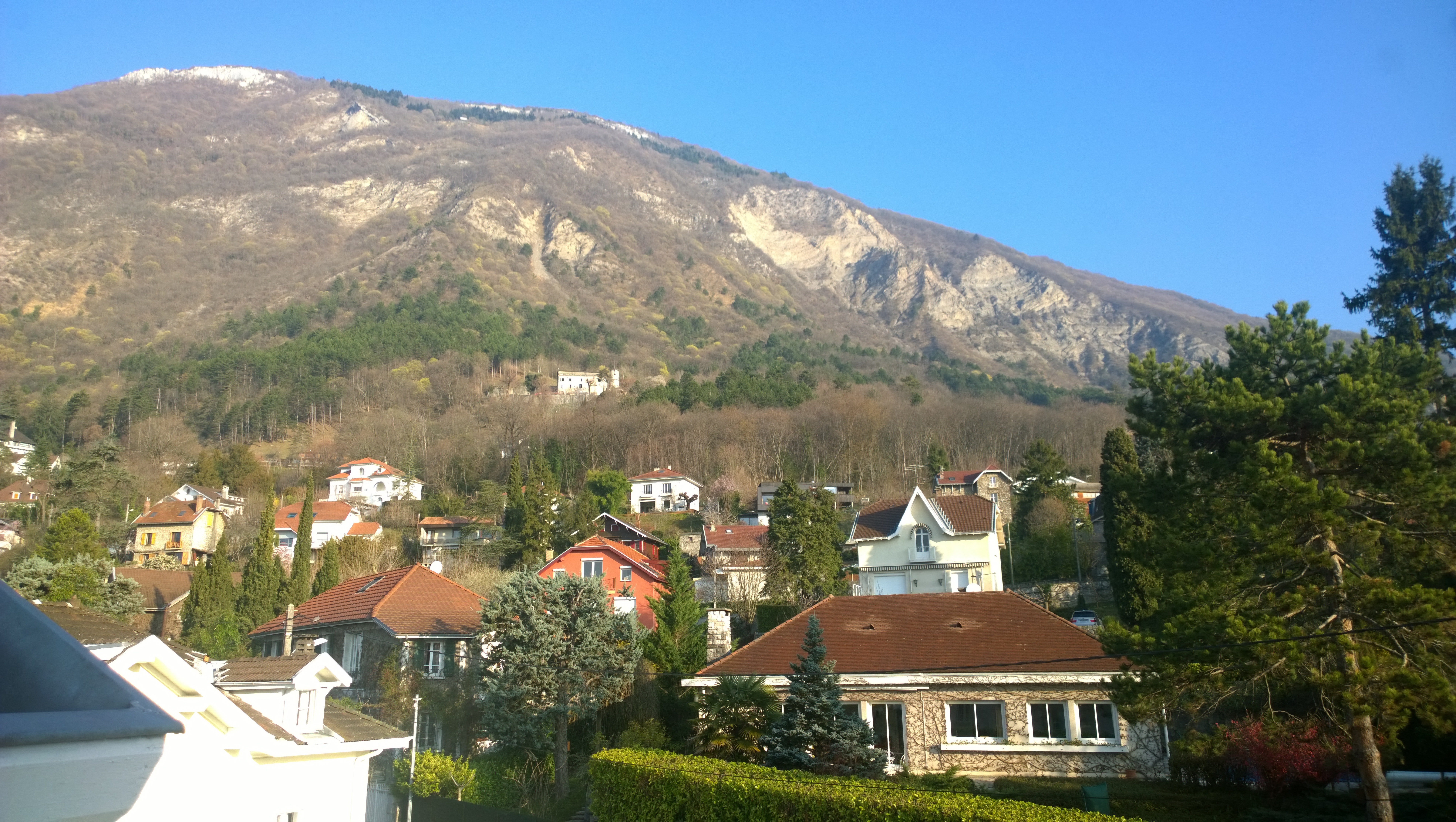 38700 La Tronche, France